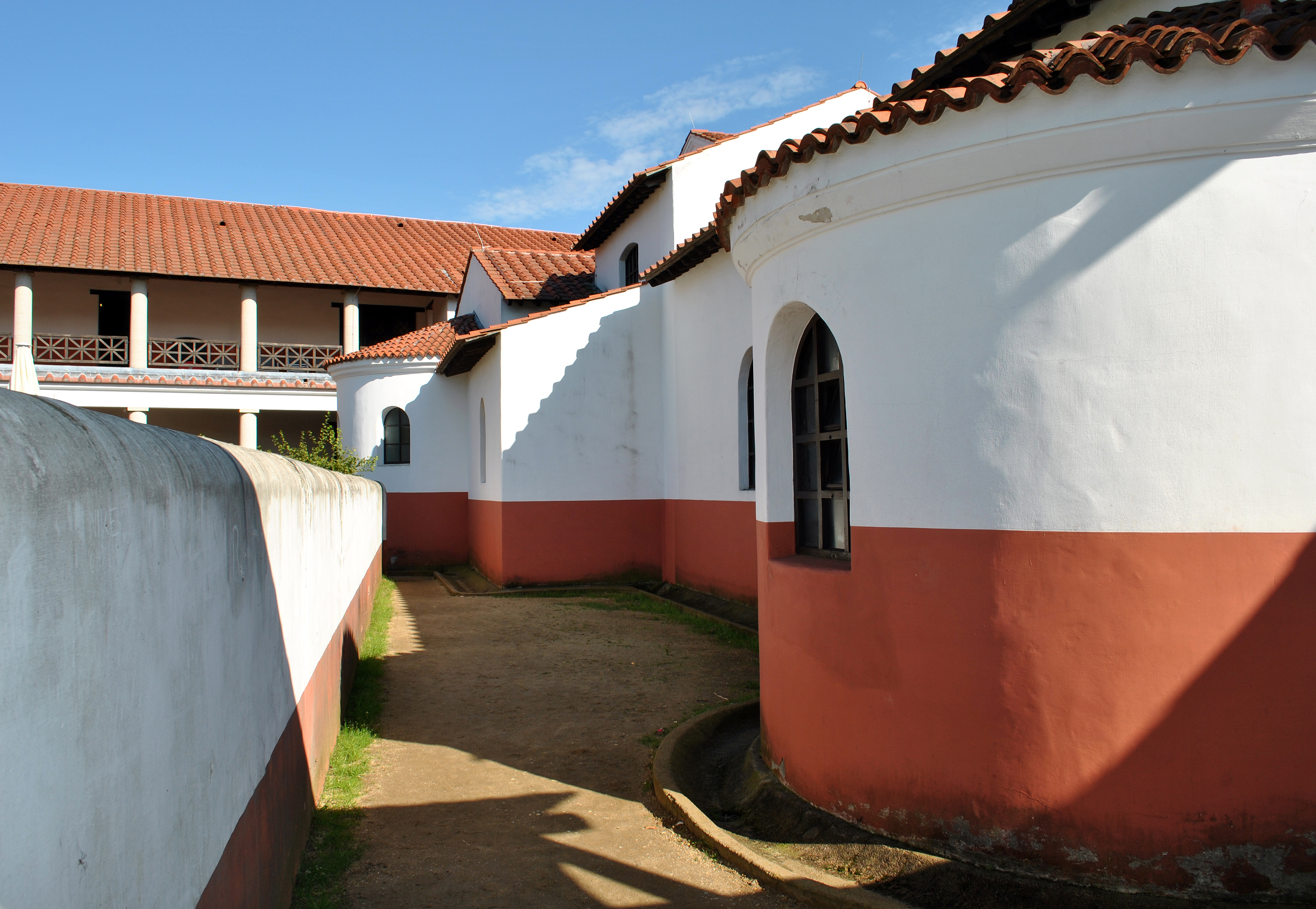 Rekonstruierte Thermen und römischen Herberge der Colonia Ulpia Traiana im Archäologischen Park Xanten